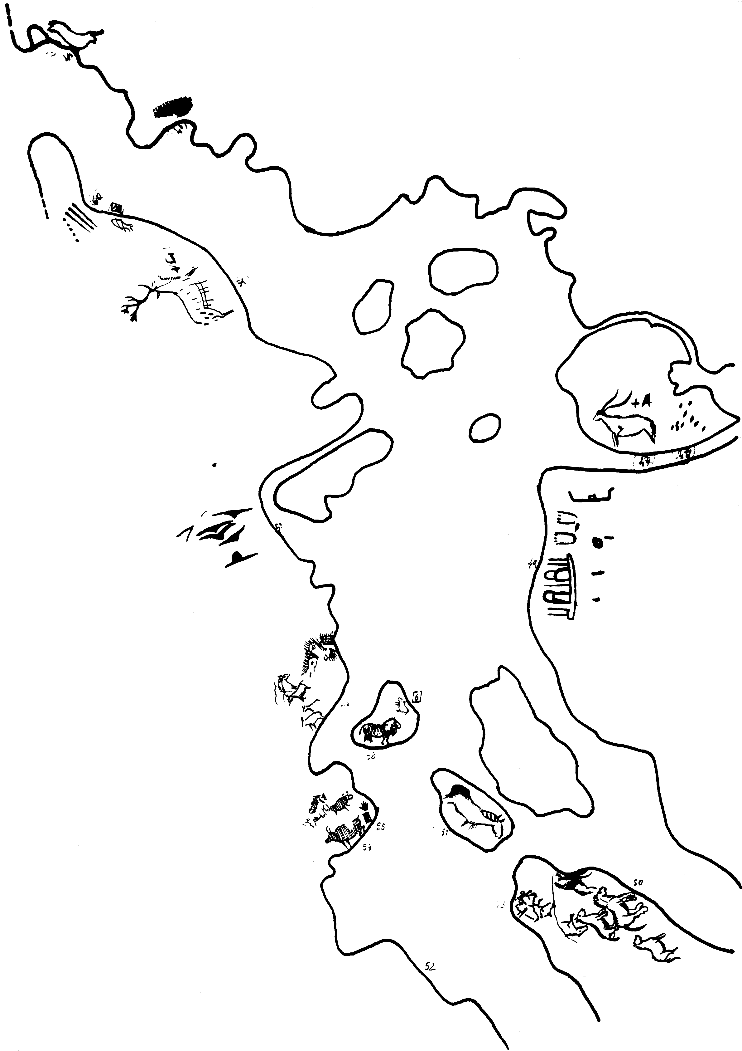 Plano de la Galería B (segundo santuario) de la Cueva de La Pasiega, en el monte Castillo, localidad de Puente Viesgo (Cantabria, España)